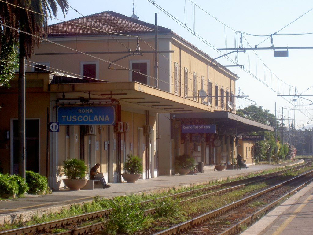 Stazione ferroviaria di Roma Tuscolana.